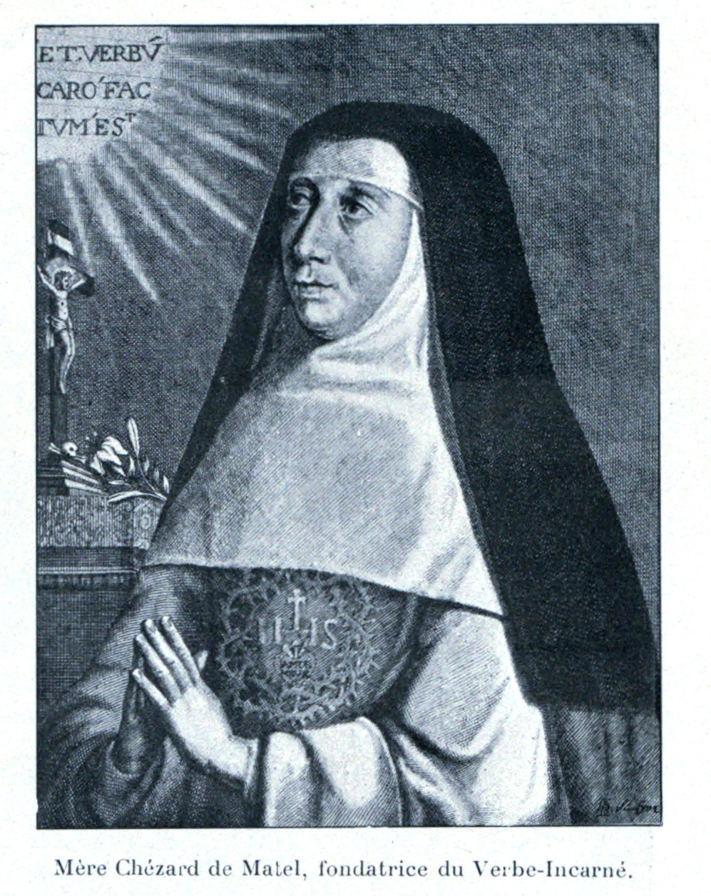 Illustration pour l'Histoire des églises et chapelles de Lyon